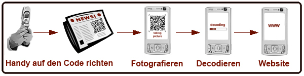 Prozess des Taggens